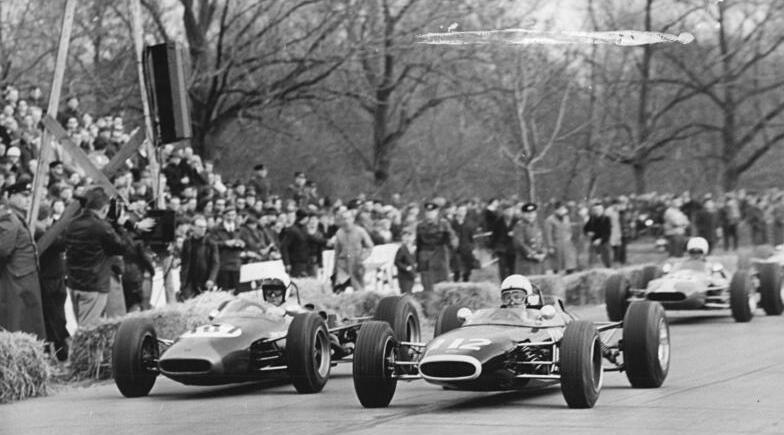 ZB-Schaar 24.4.1967 Halle: 22. Internationales Halle-Saale-Schleife-Rennen für Auto und Motorräder am 23.4.1967 Start der Formel 3 Rennwagen bis 1000 ccm. Sieger wurde der Belgier Paul Deetens (links) auf Brabham.